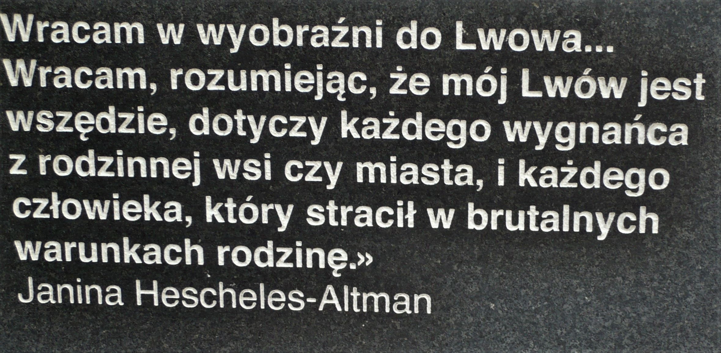 Synagoga Złota Róża we Lwowie. Pomnik